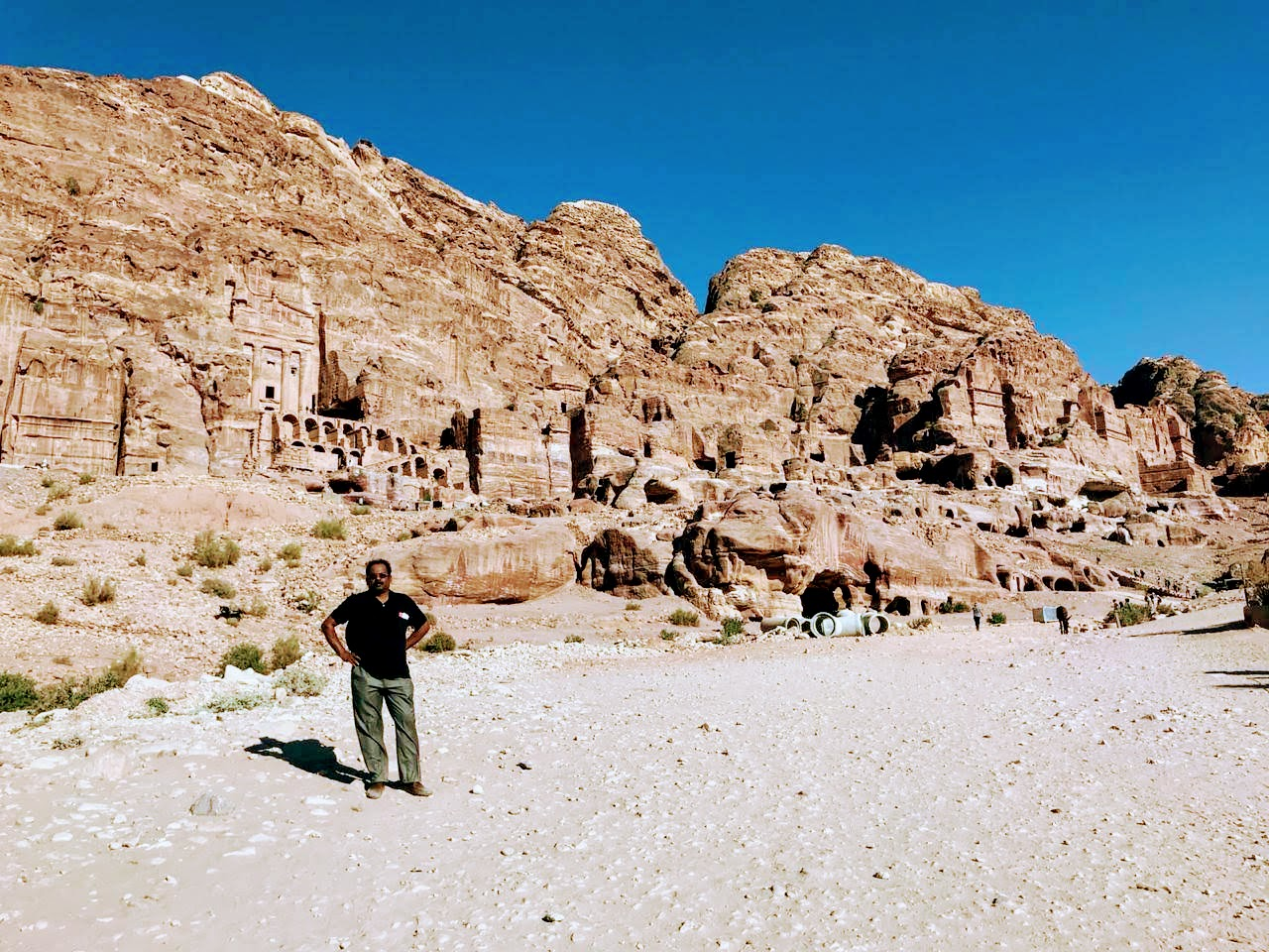 വിസ്തൃതിയുള്ള പ്രധാന നഗര പ്രദേശത്തിന്റെ ഒരു ഭാഗം! വലതുവശത്ത് കോണിന് ചുറ്റും ഹാട്രിയൻ ചക്രവർത്തിയുടെ കീഴിലുള്ള റോമൻ ഭരണാധികാരിയായ സെക്റ്റസ് ഫ്ലോറന്റീനിയസിന്റെ ശവകുടീരം ഉണ്ട്